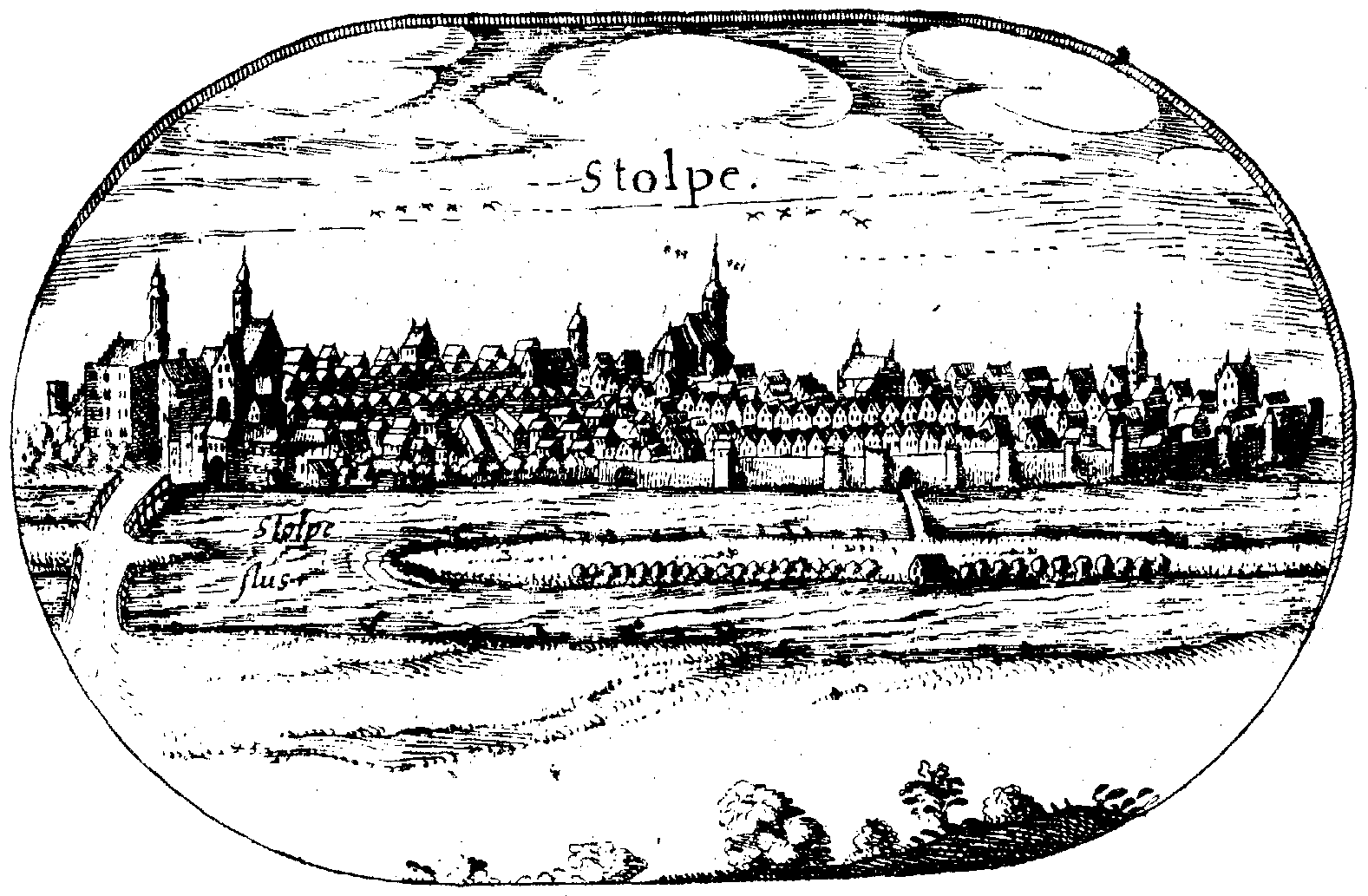 Rycina miasta Słupsk z mapy Lubinusa - Mapa księstwa pomorskiego z 1618 roku.